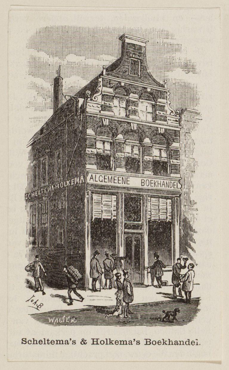 Beschrijving Scheltema's & Holkema's Boekhandel Afbeelding van Rokin 74, Scheltema's en Holkema's boekhandel. Links de Wijde Kapelsteeg. Houtgravure. Documenttype prent Vervaardiger Braakensiek, J.C. (Johan Coenraad, 1858-1940) Walter, Joh. Collectie Collectie Atlas Dreesmann Datering 1875 t/m 1900 Geografische naam Rokin Inventarissen Afbeeldingsbestand 010094006905